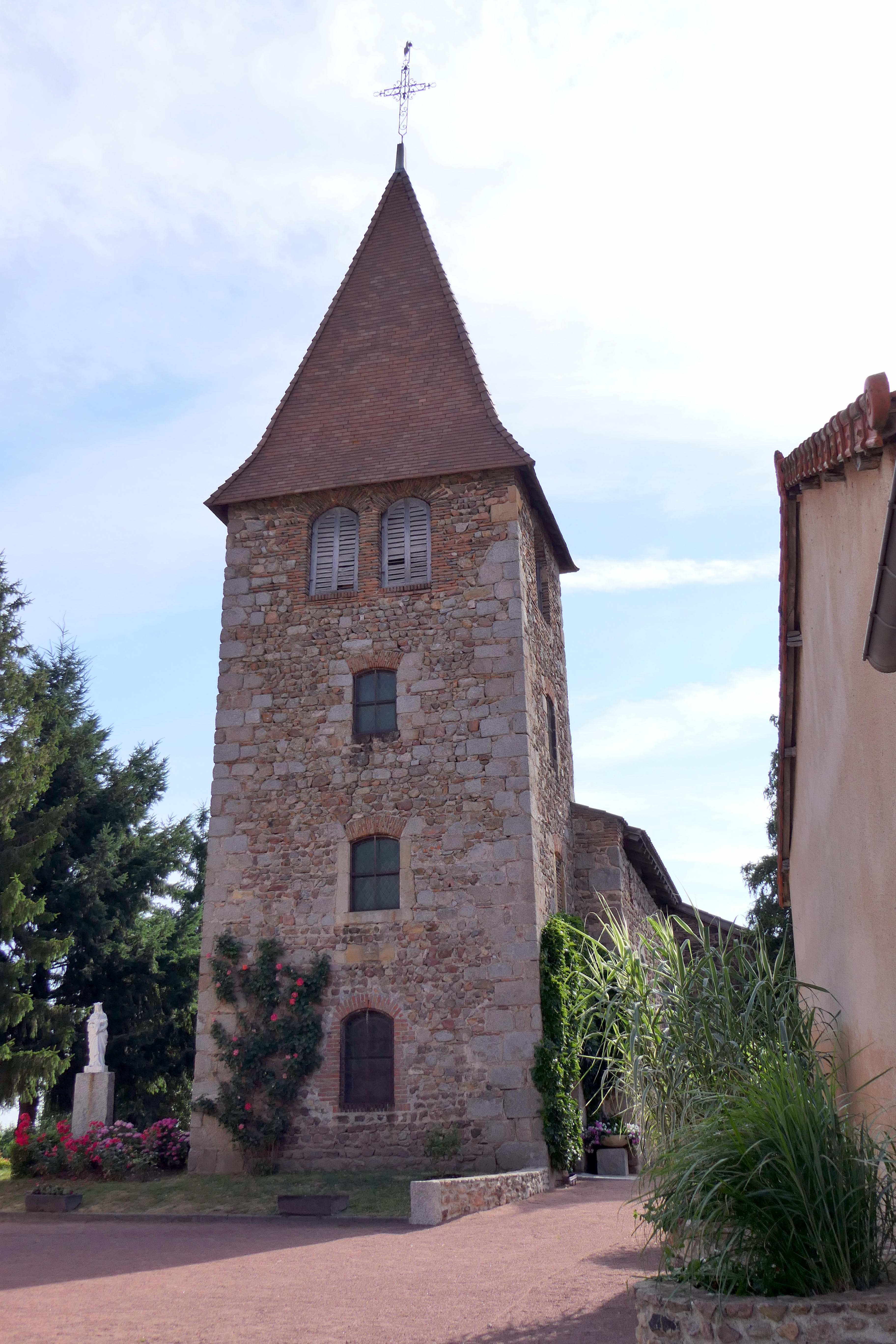 Vivans, l'église